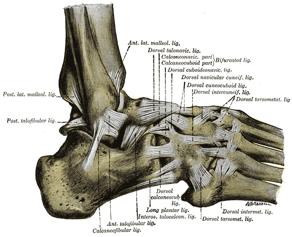 Bandapparat OSG und Fuß, von fibular